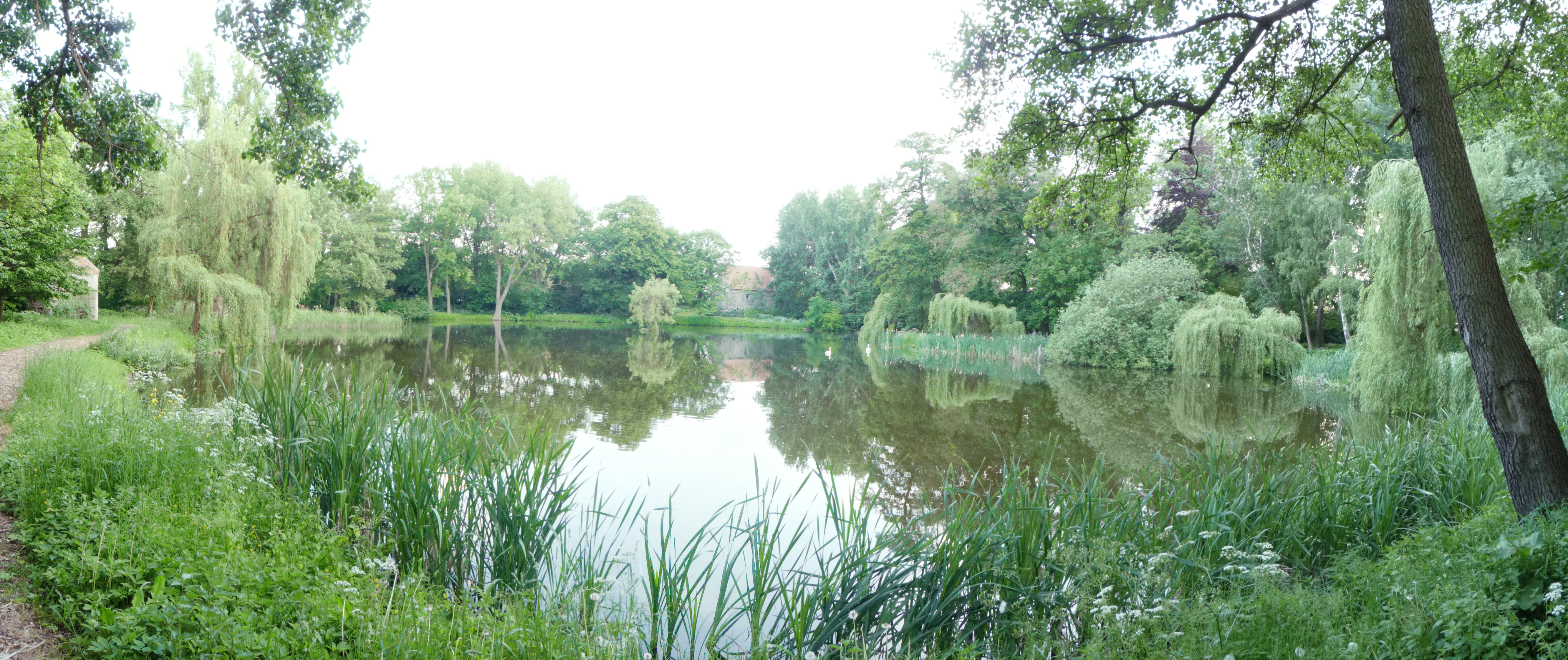 Gutspark des Thaerhof Möglin (Der private Park steht der Öffentlichkeit zur Verfügung. Pflege und Erhaltung werden durch die Thaerhof Möglin Agrar GmbH ohne öffentliche Förderung oder Unterstützung durchgeführt.)